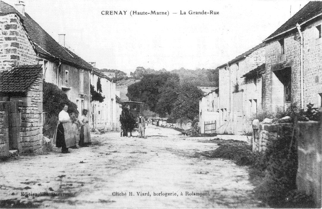 Carte postale ancienne La Grande-Rue de Crenay, commune de Foulain, Haute-Marne, France